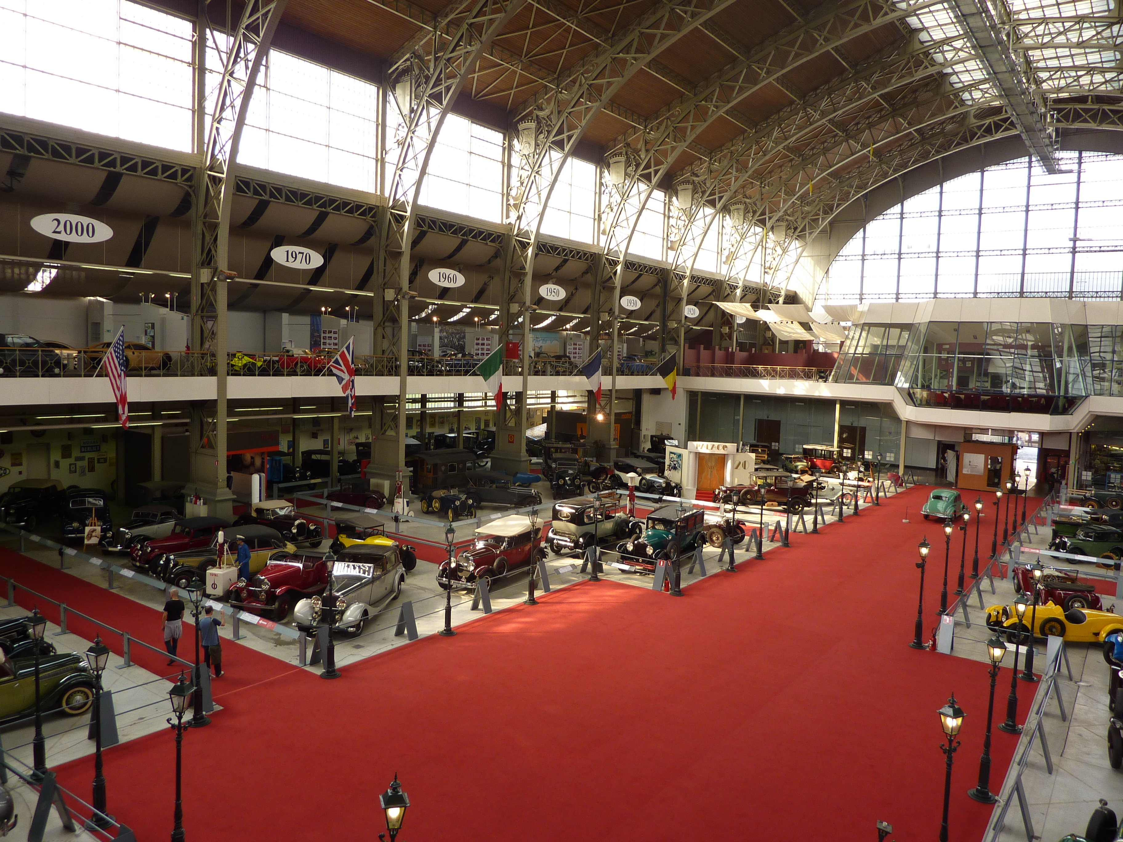 Le musée de l'Autoworld à Bruxelles, Belgique.